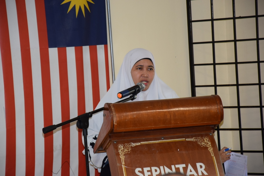 Puan Hajah Siti Aida Binti Ibrahim, Guru Penolong Kanan Bidang Pendidkan Islam sedang menyampaikan ucapan ketika Perhimpunan Bulanan April 2016 di Bilik Seminar pada 29 April 2016.